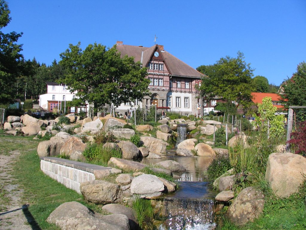 Wasserspiele im Kurpark von Schierke, selbst photographiert am 6.09.2005 um 16.55.